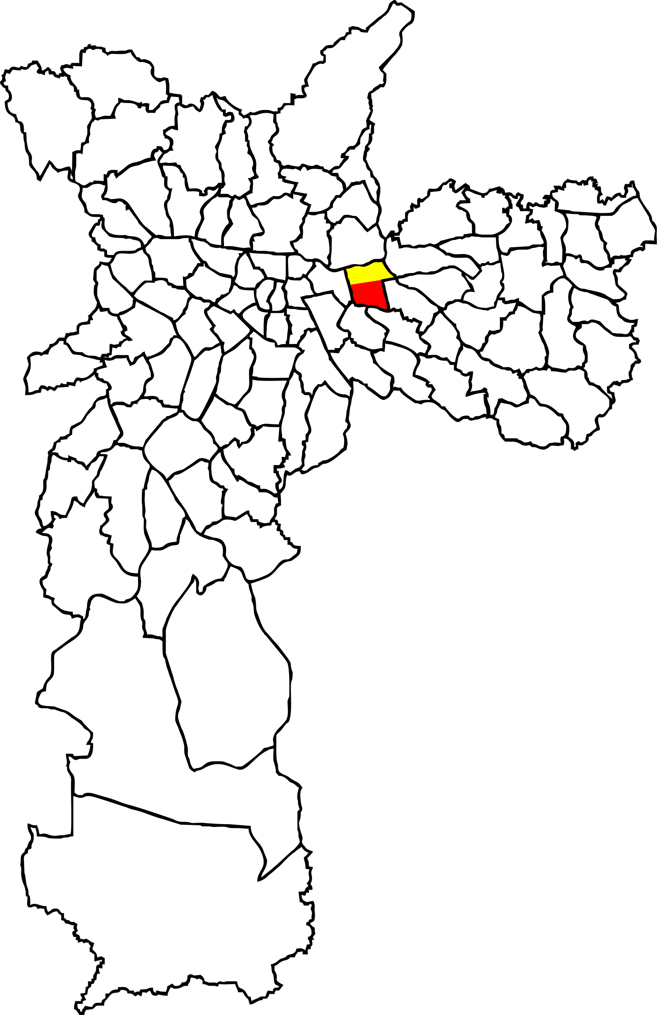 Localização do distrito de Tatuapé no município de São Paulo.